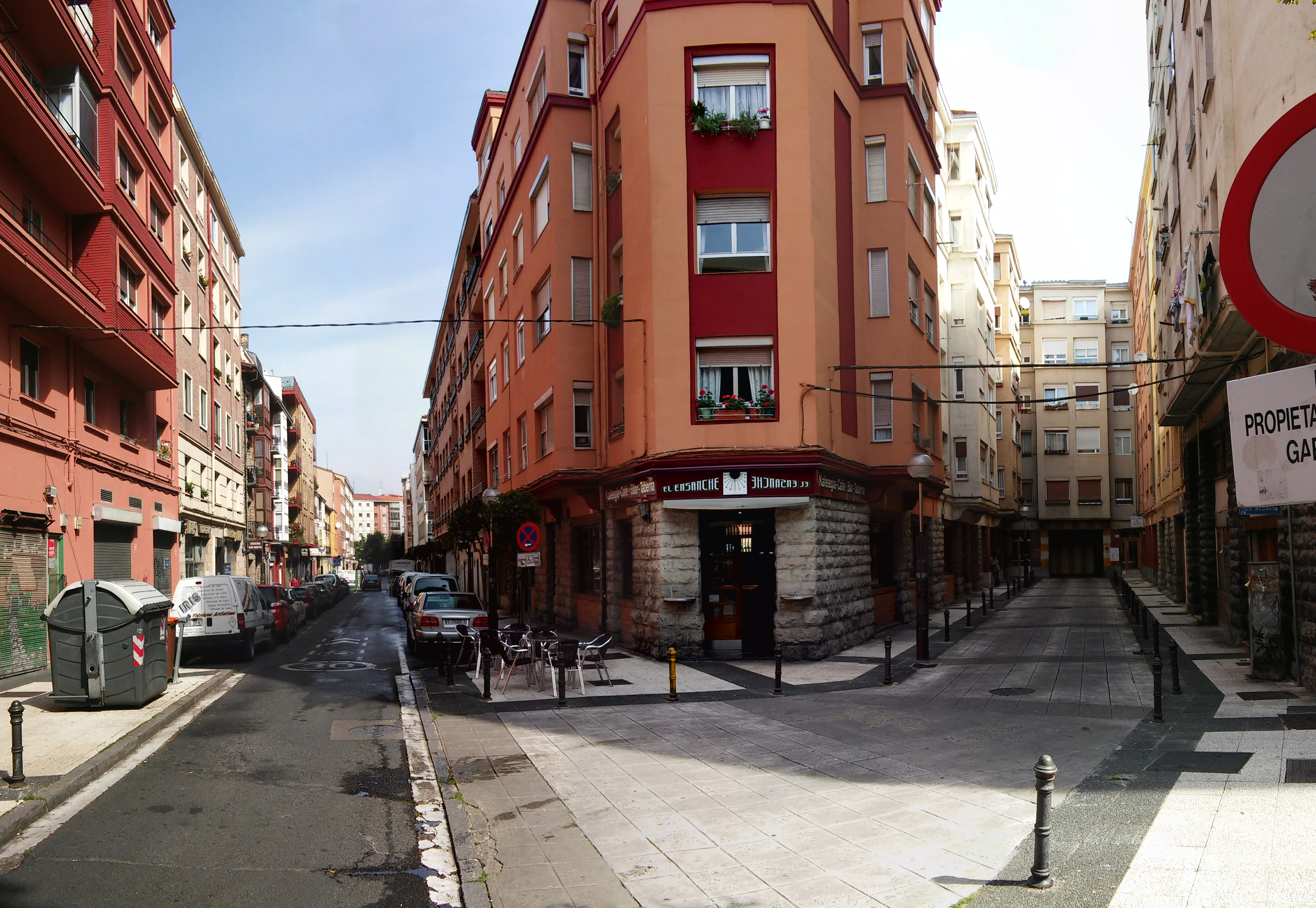 Gasteizko Koroatzea auzoko Aldabe kalea